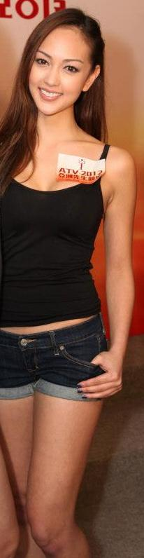 гонконгские топ-модели Ana R. и Jessica C.